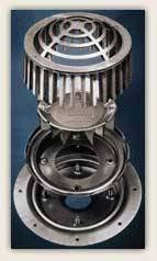 Photo d'une naissance qui permet l'évacuation des eaux pluviales.